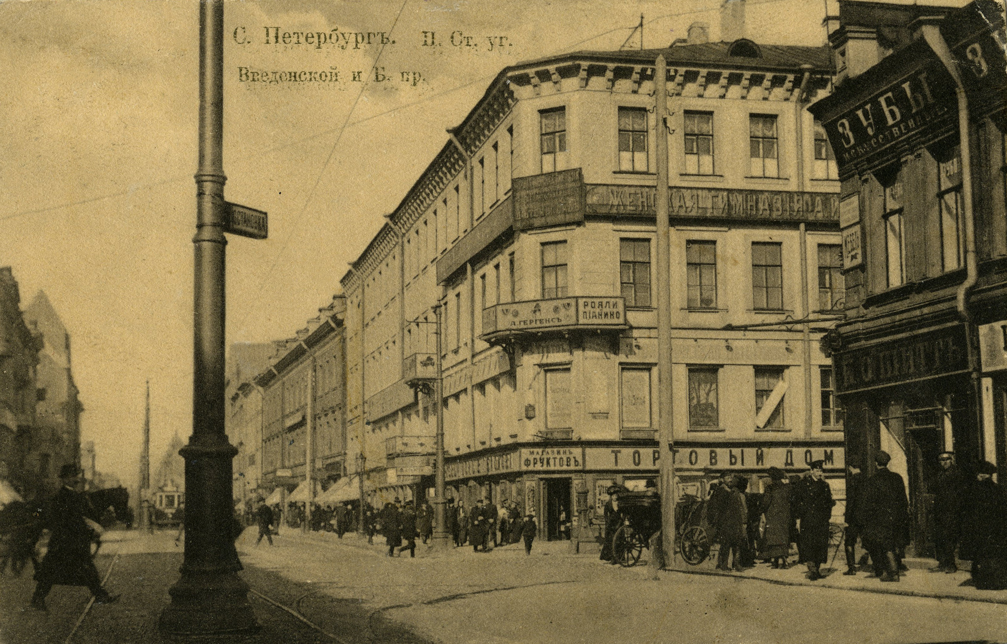 Открытка. Санкт-Петербург, перекрёсток Большого проспекта Петроградской стороны, д. 29 и Введенской улицы. Открытка. (к. п. л. № 1068).